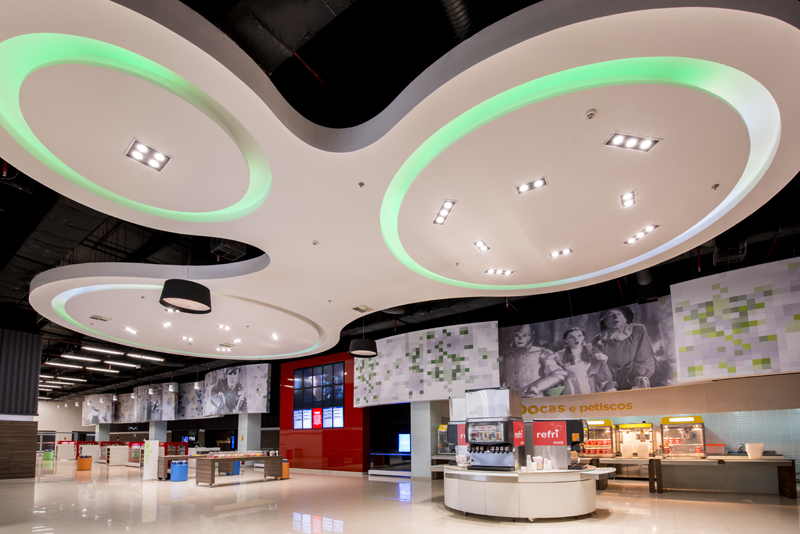 Bomboniere autosserviço.